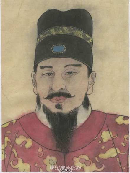 中文（香港）: 明代慶靖王朱栴